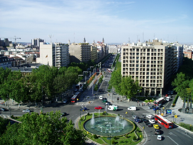 Plaza de Basilio Paraíso (Zaragoza, Aragón).